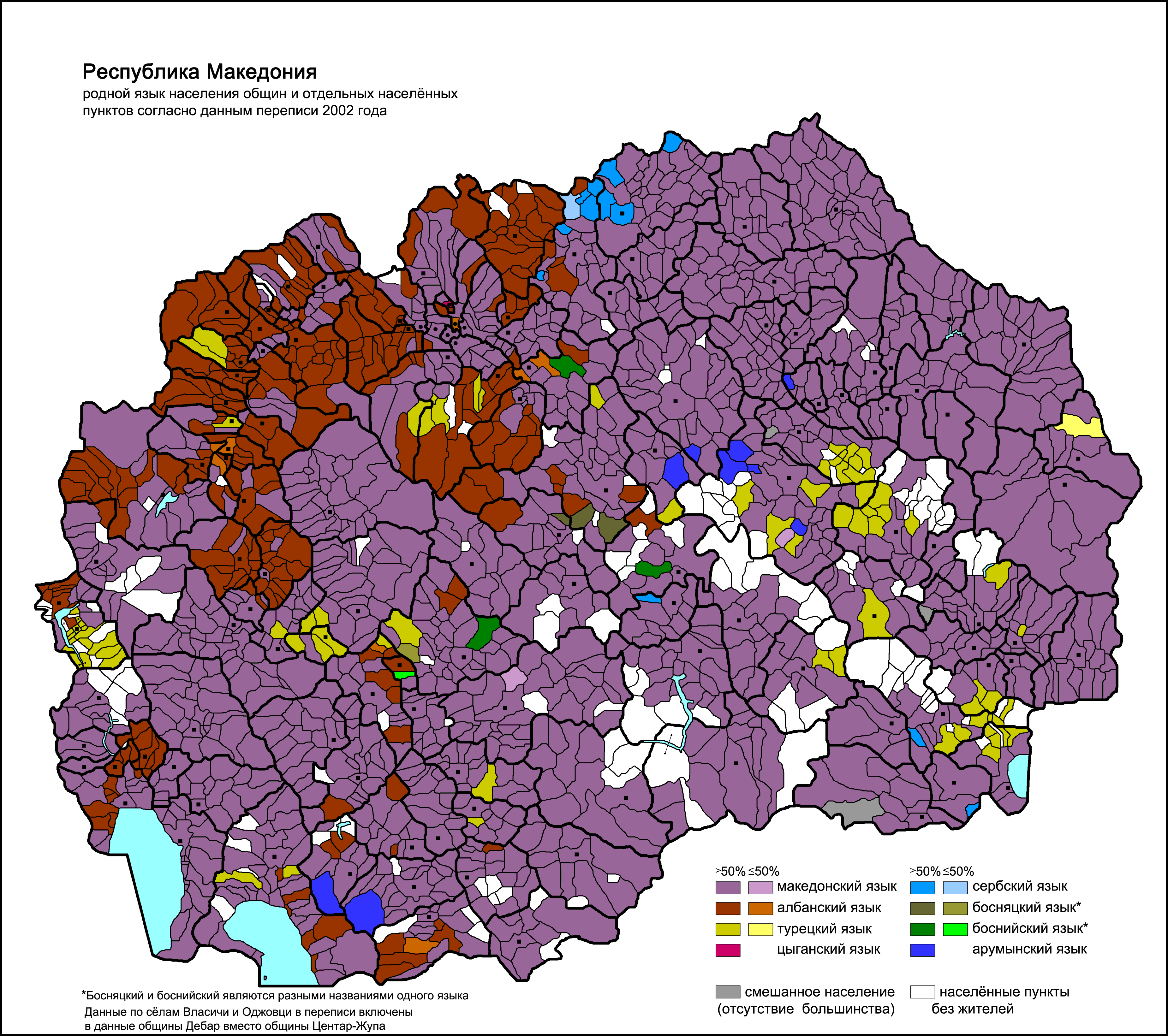 Родной язык населённых пунктов и общин в Республике Македония согласно данным переписи населения 2002 года